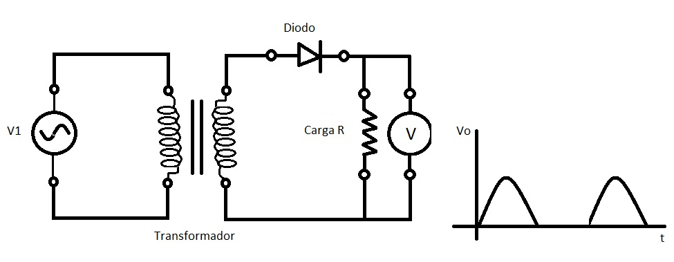 imagem de um retificador de meia onda com um voltímetro em paralelo com a carga